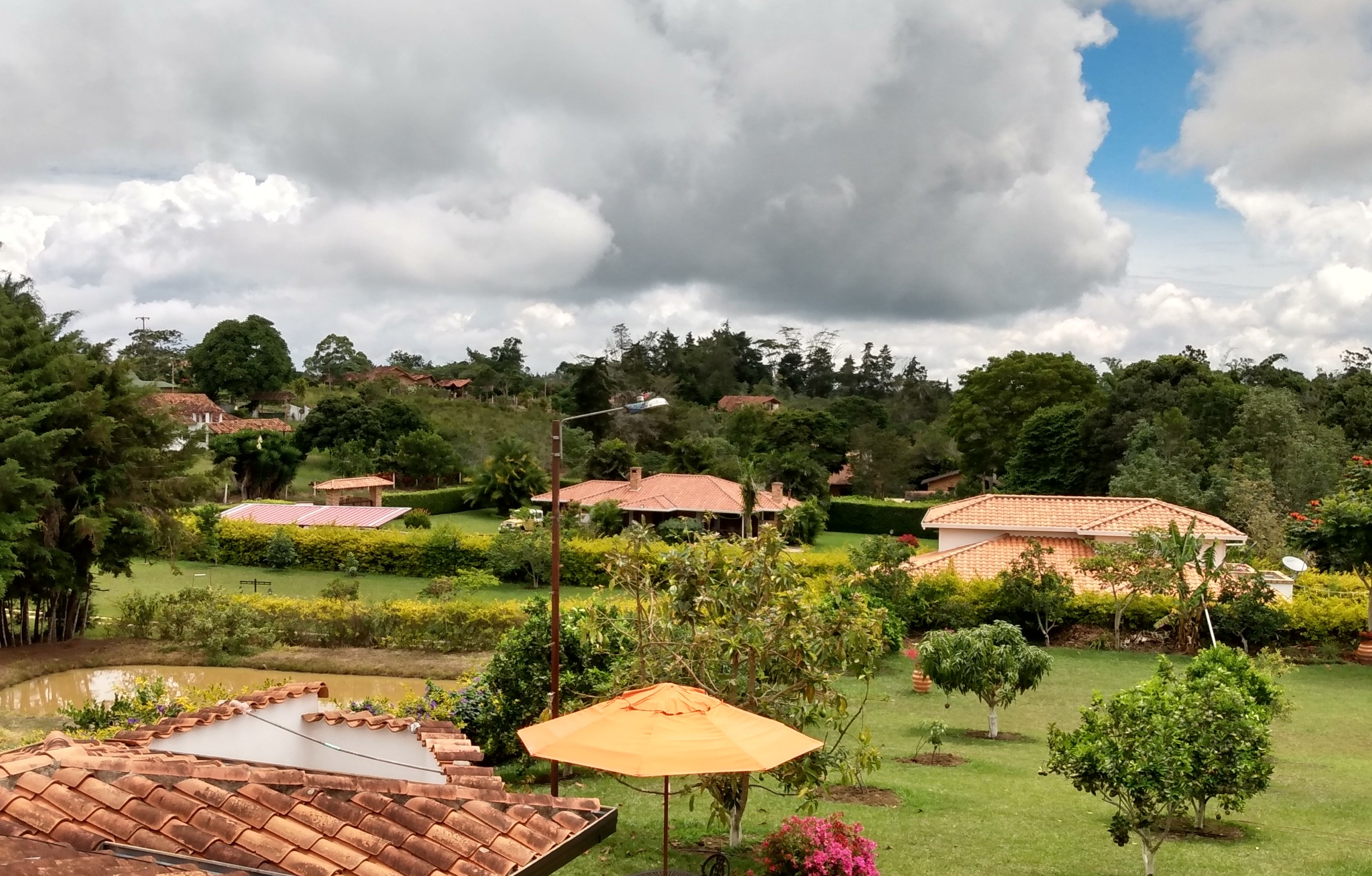 parcelas acuarela